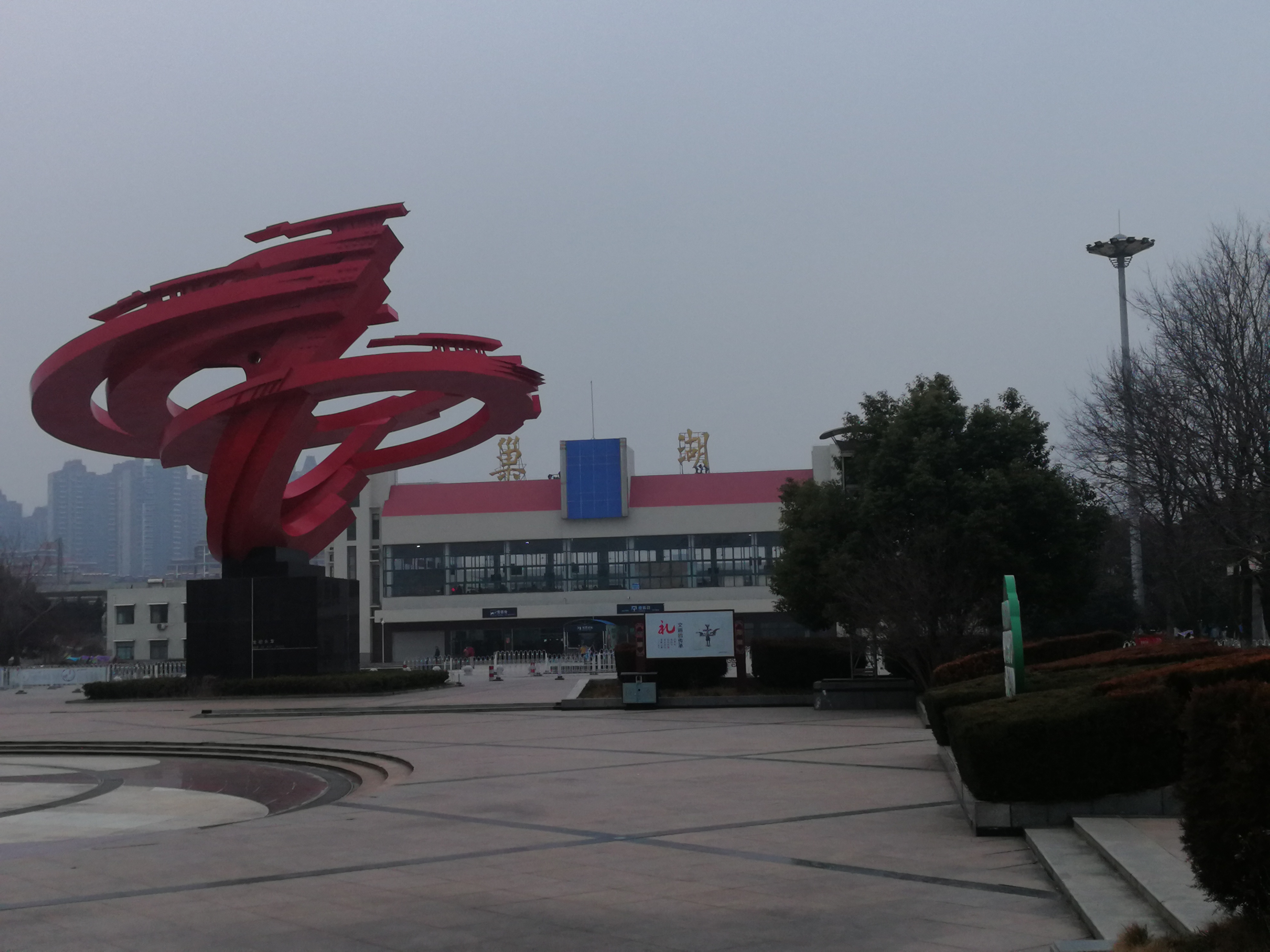 巢湖市火车站景色